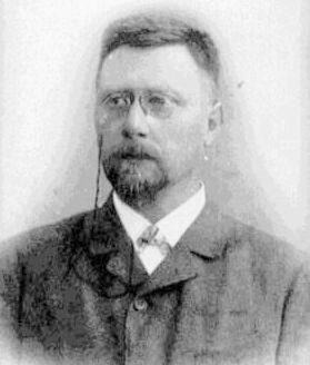 Рудолф Фердинанд Шпиталер, аустријски астроном (1859.-1946.)